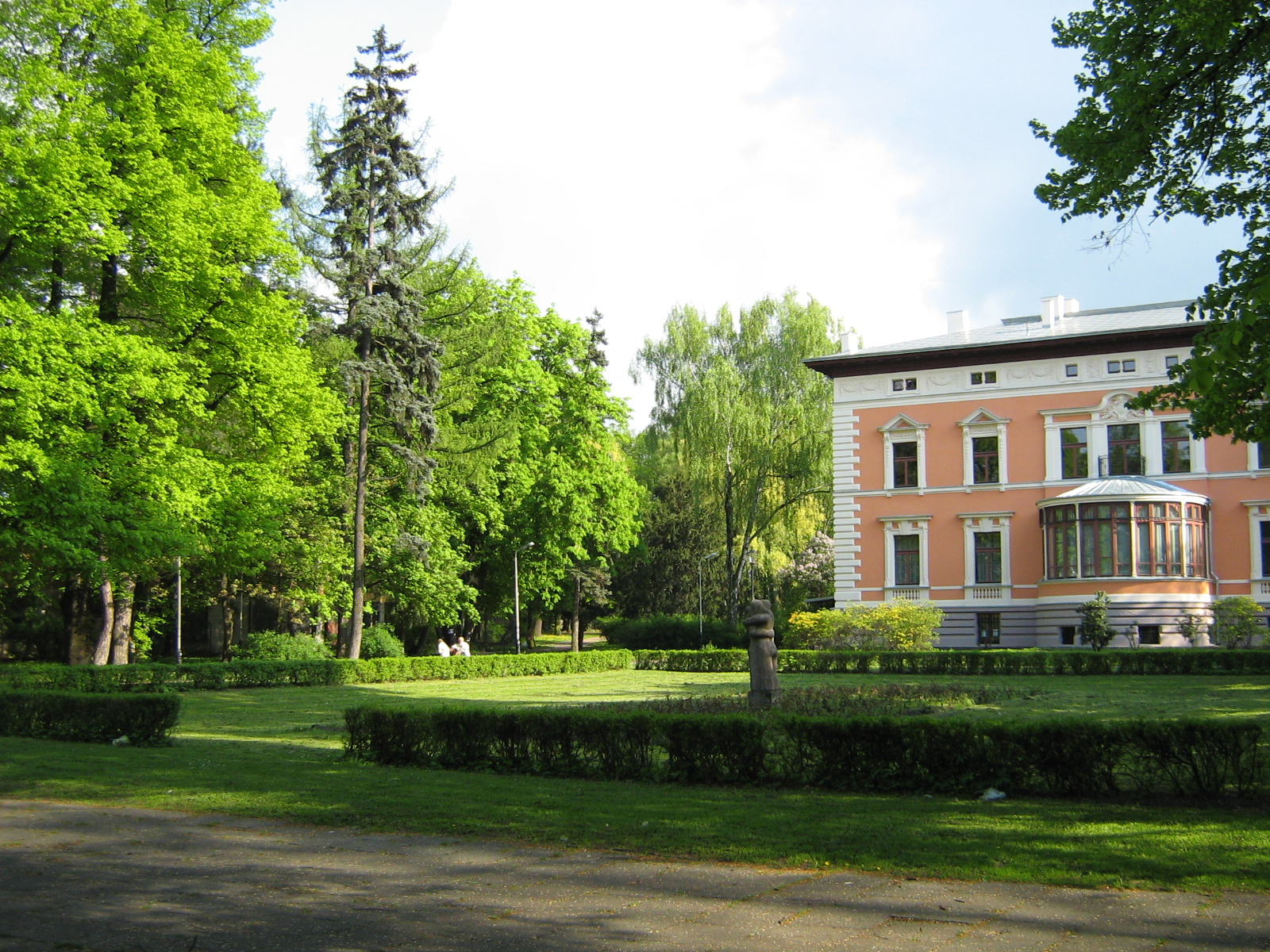 Park im. Legionów w Łodzi